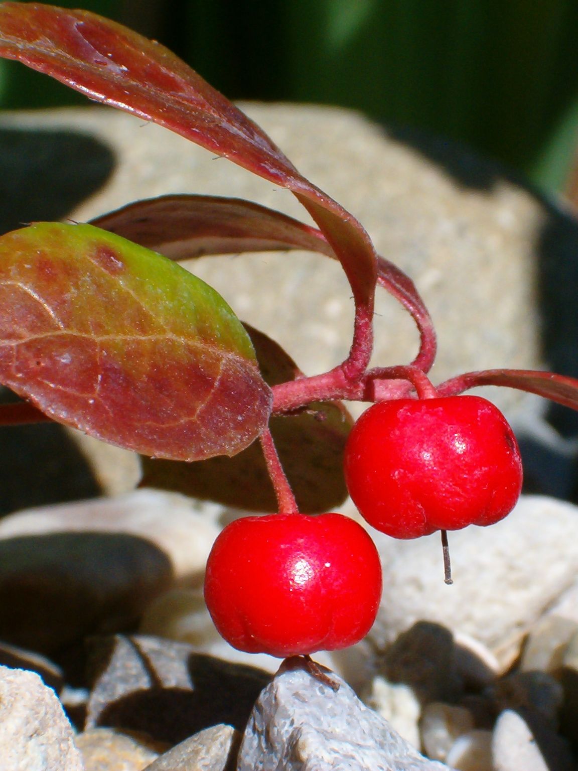 Golteria